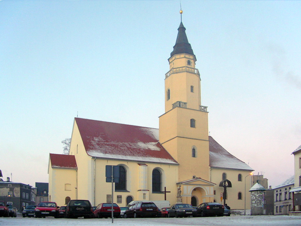 Die Pfarrkirche St. Hedwig in Greiffenberg